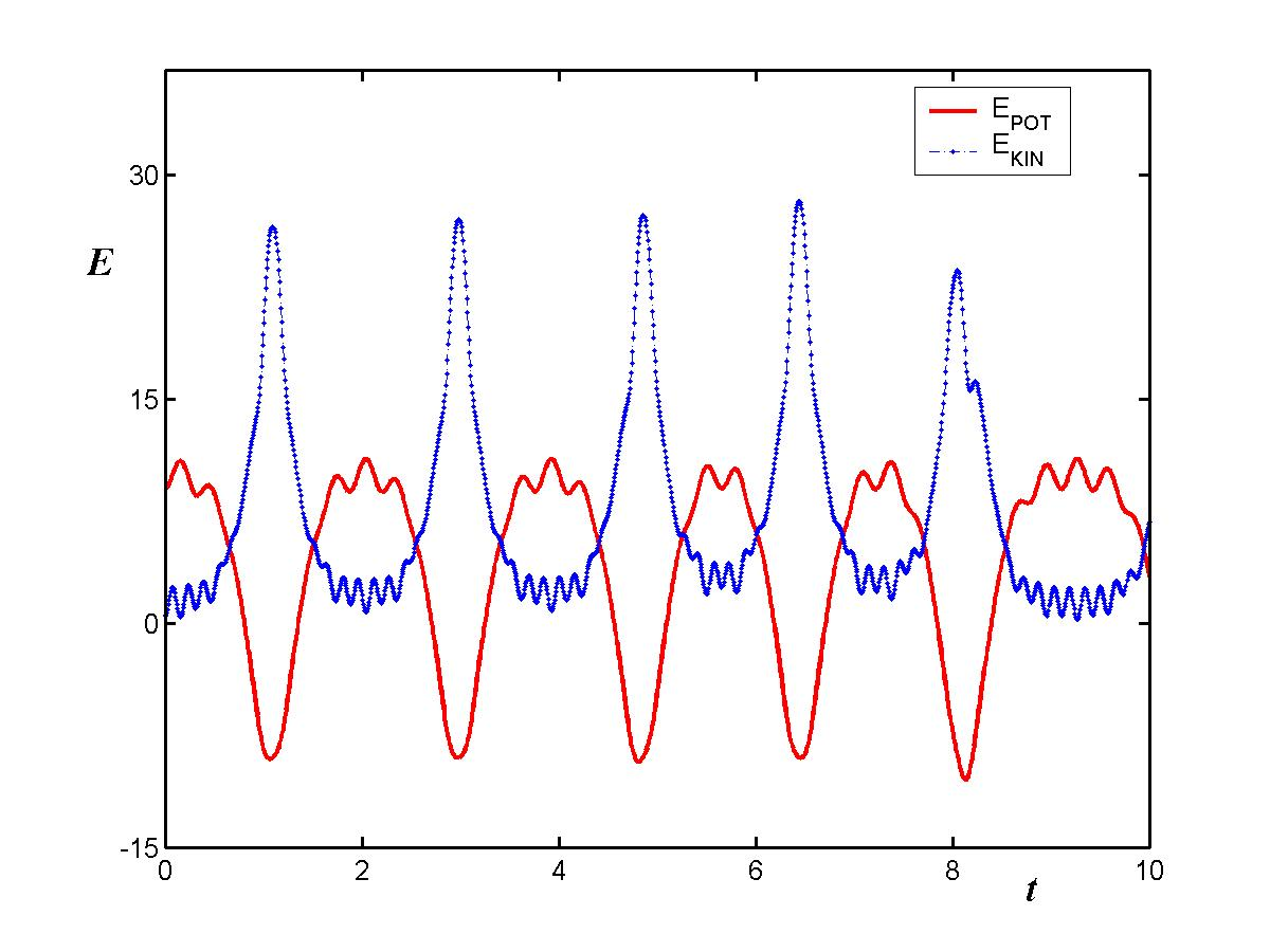 Маятник Капицы, пример потенциальной и кинетической энергии.